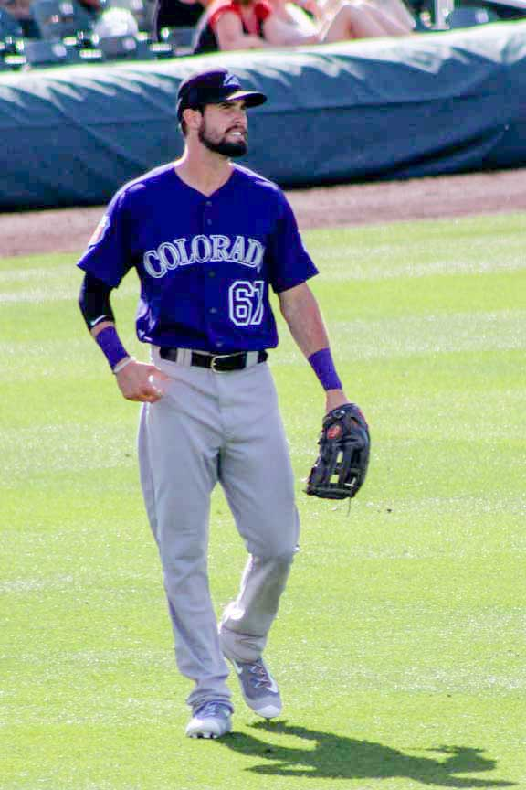 David Dahl